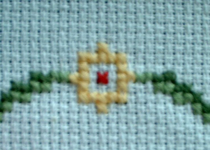 Etamingewebe mit Stickereiarbeit